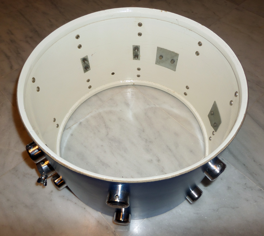 SAMSUNG CAMERA PICTURES